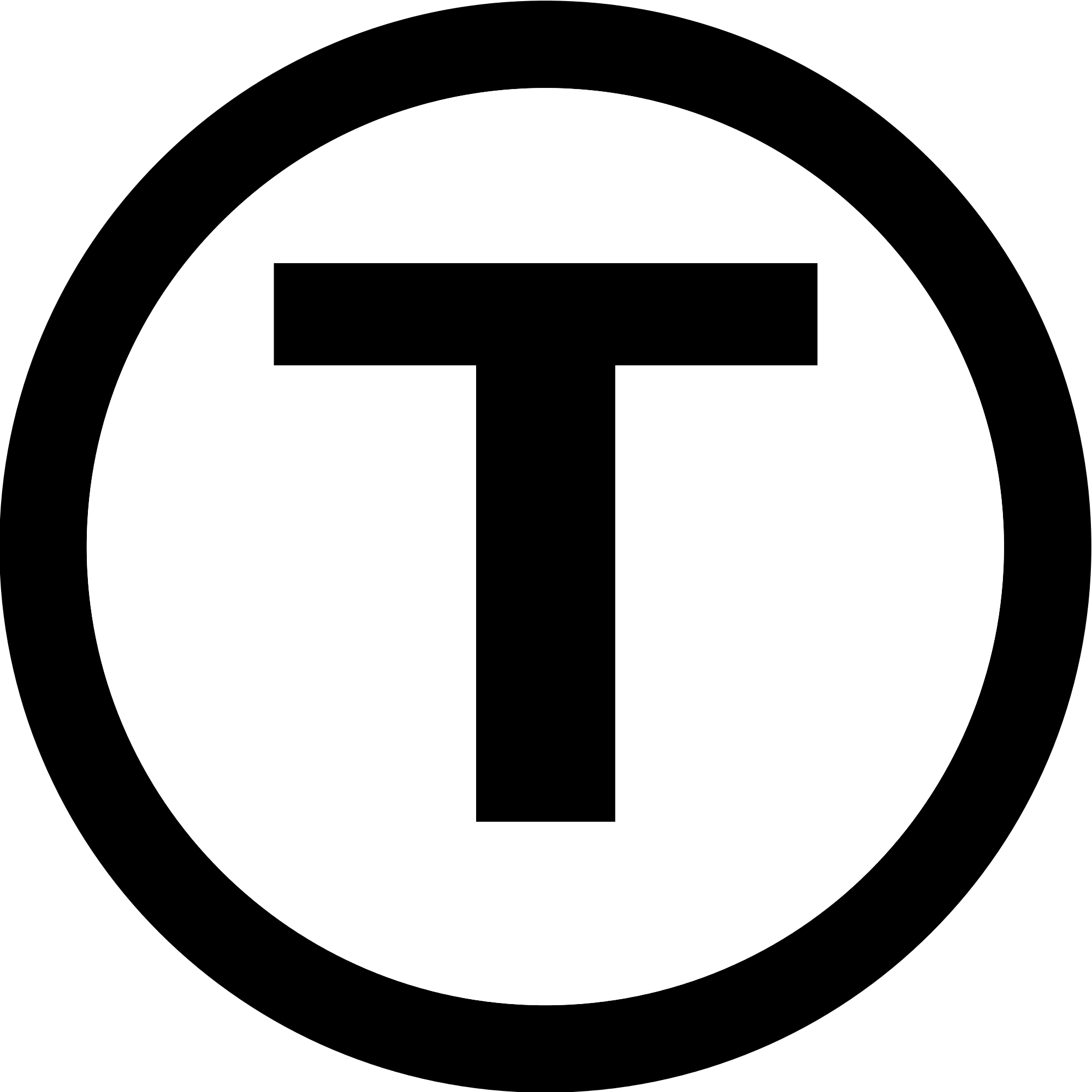 Logo du tramway de Montpellier